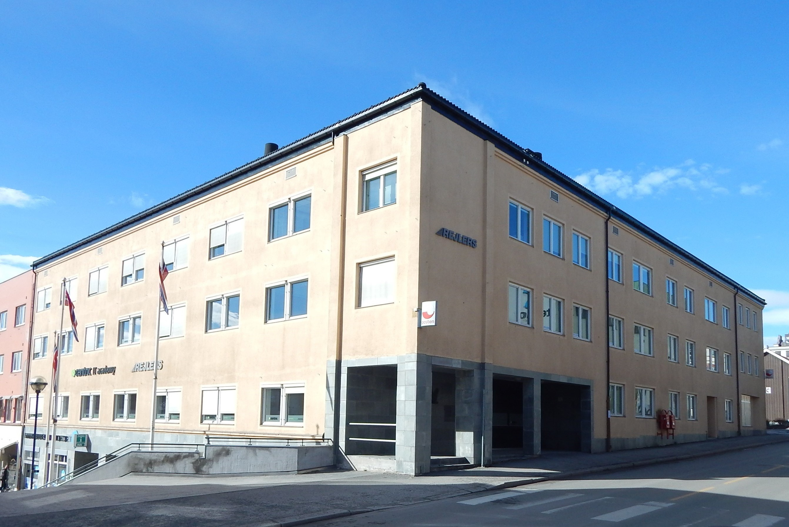 Posthusgården i Grønnegata 52, Hamar. Arkitekter: Finn Poppe, Ørn Klingenberg og Trygve Klingenberg.